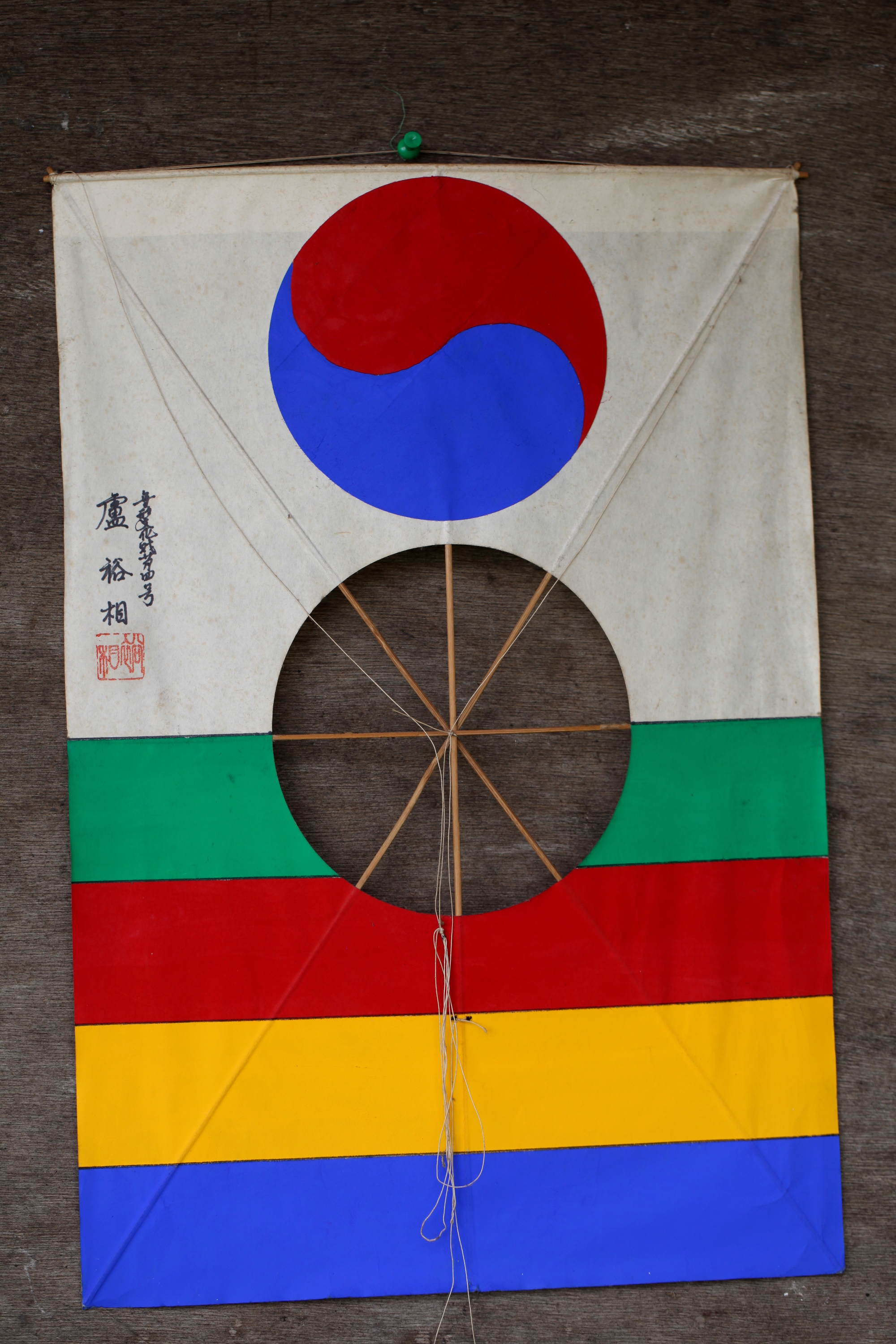 Un cerf-volant combattant coréen.